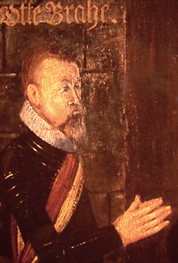 Otte Thygesen Brahe (1518-1571), dansk riksråd afbildet på epitafium i Kågerød Kirke, Skåne